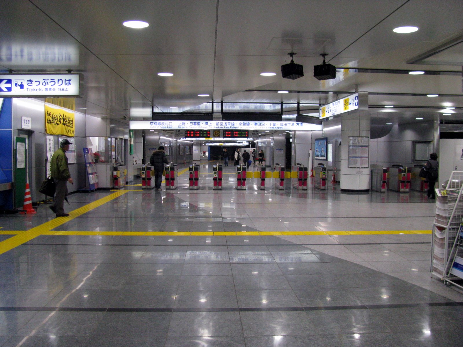 京成船橋駅改札口付近